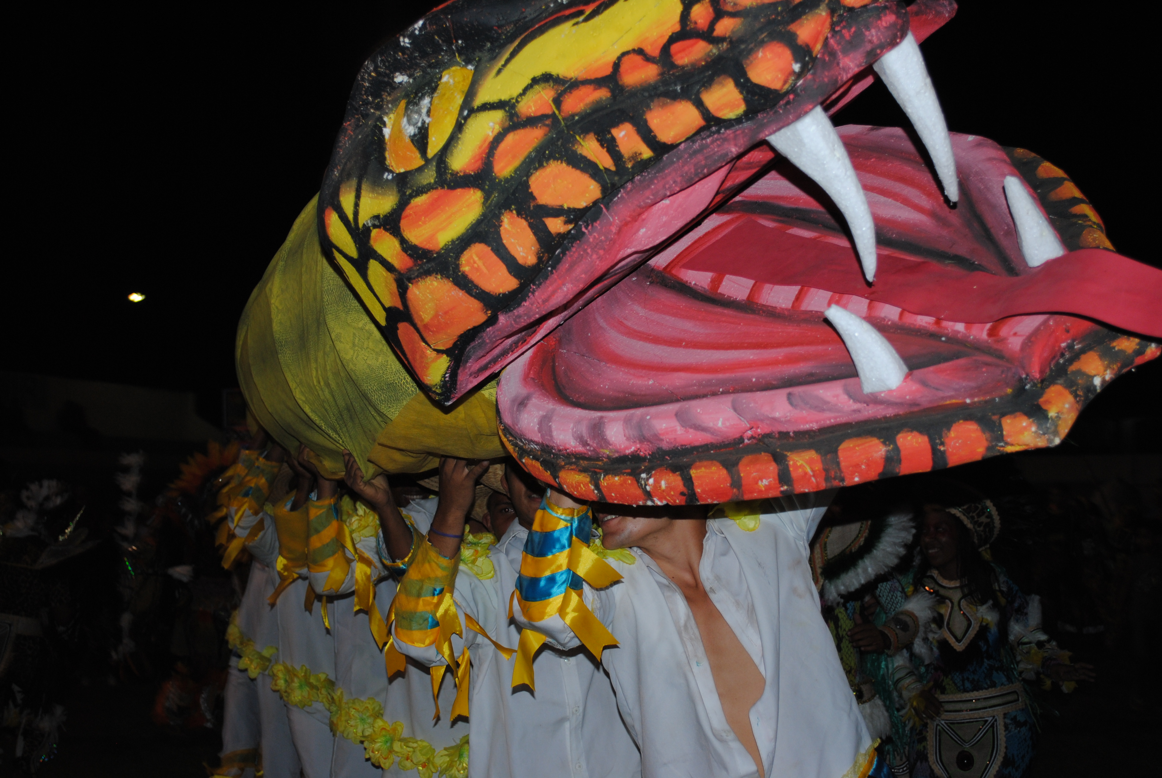 ponta